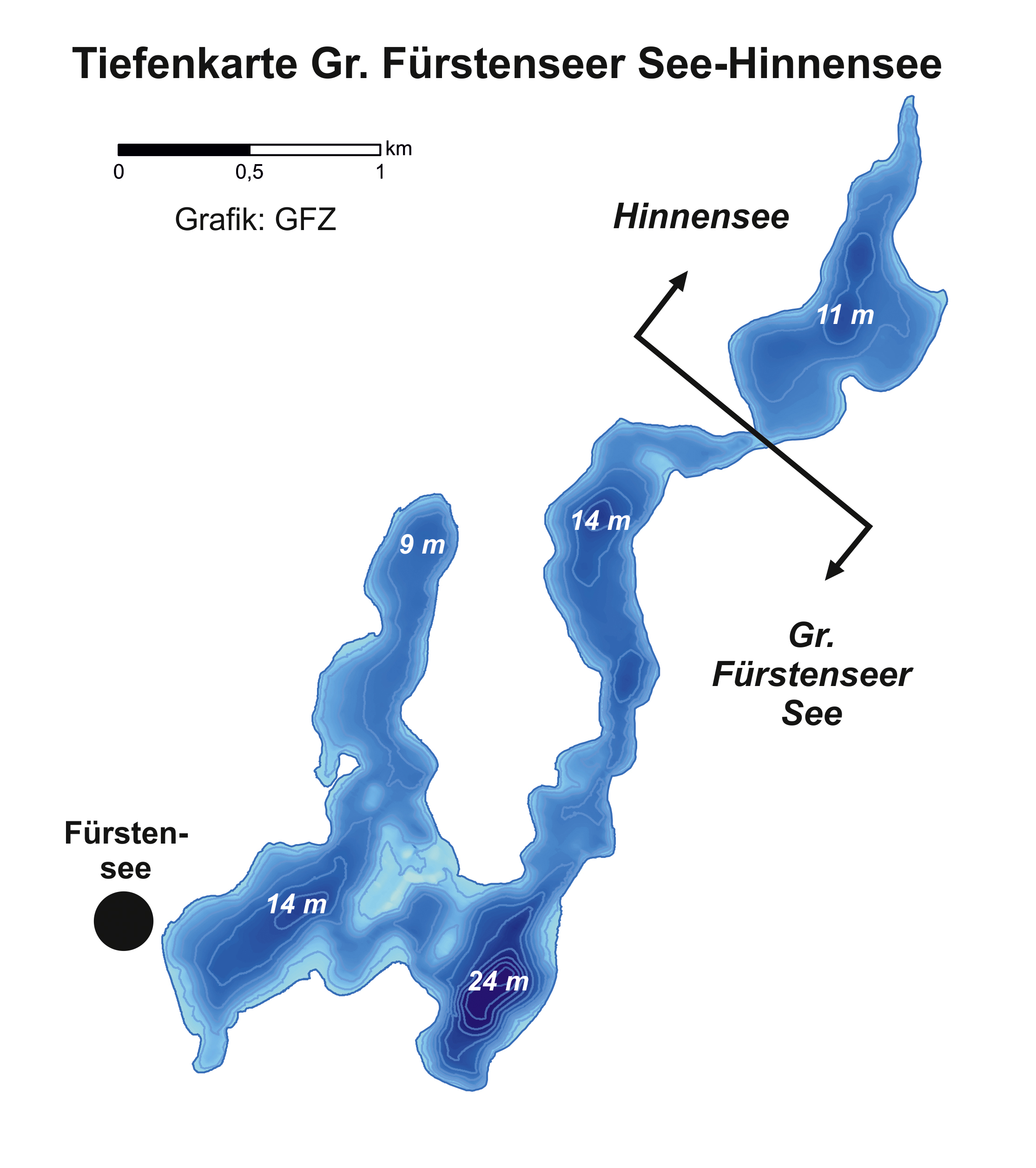 Tiefenkarte des Großen Fürstenseer See-Hinnensees